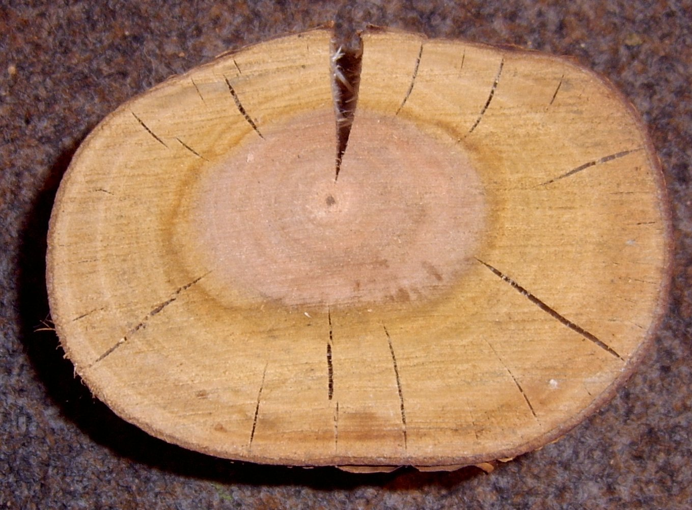 Foto taken by Lumbar 16:51, 6 November 2005 (UTC) in Osnabrück